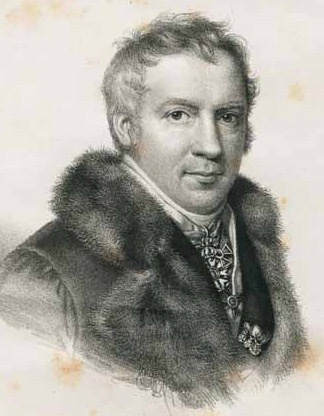 Lithografie ([1]) nach Joseph Karl Stieler (1781–1858): Egid von Kobell (1772–1847), ab 1836 bayerischer Staatsrat. Porträtsammlung des Münchner Stadtmuseums, Inv. Nr. G M IV/849.